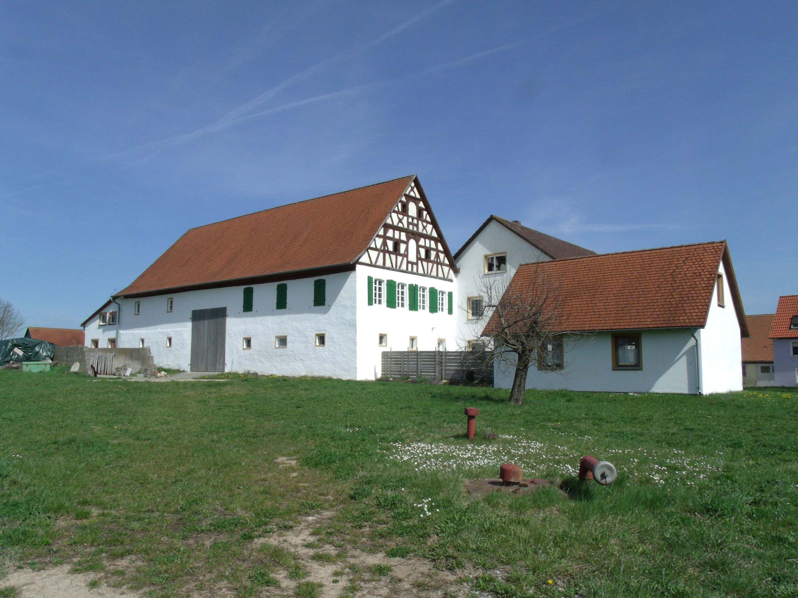 Sachsen, Ortsteil von Leutershausen im Landkreis Ansbach